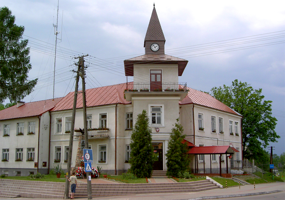 Biszcza, Poland • Urząd Gminy / Commune Council